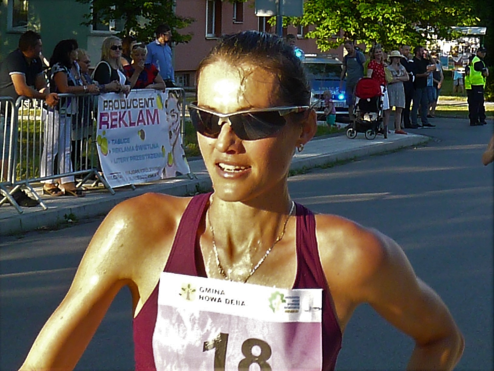 Paulina Buziak, Nowa Dęba 2017-06-18